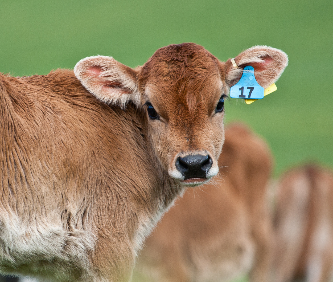 17 - designer earring